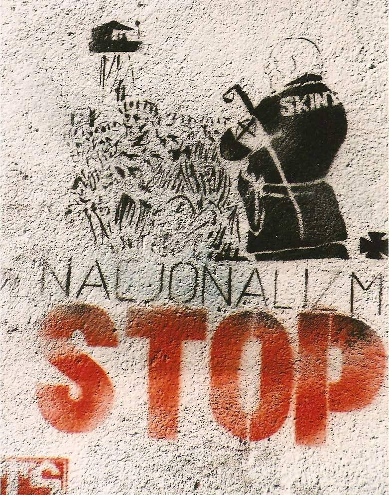 Squat Rozbrat